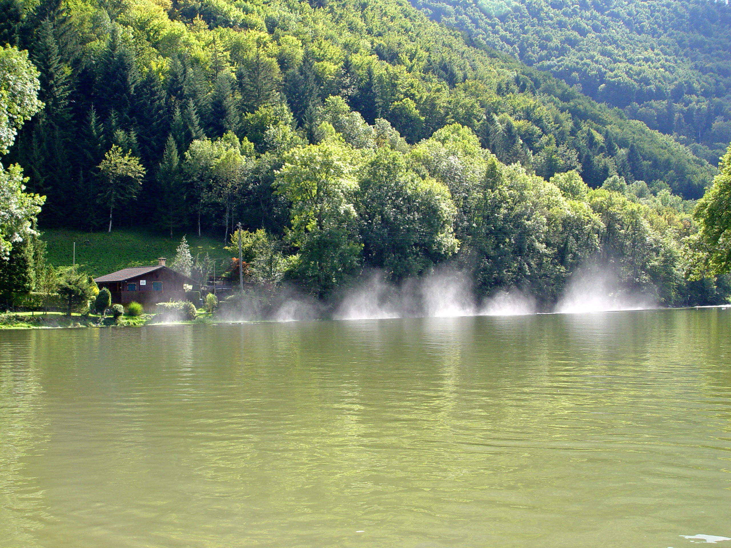 Ein Wasser-Wehr errichtet an Le Doubs; dieses liegt kurz vor Ocourt